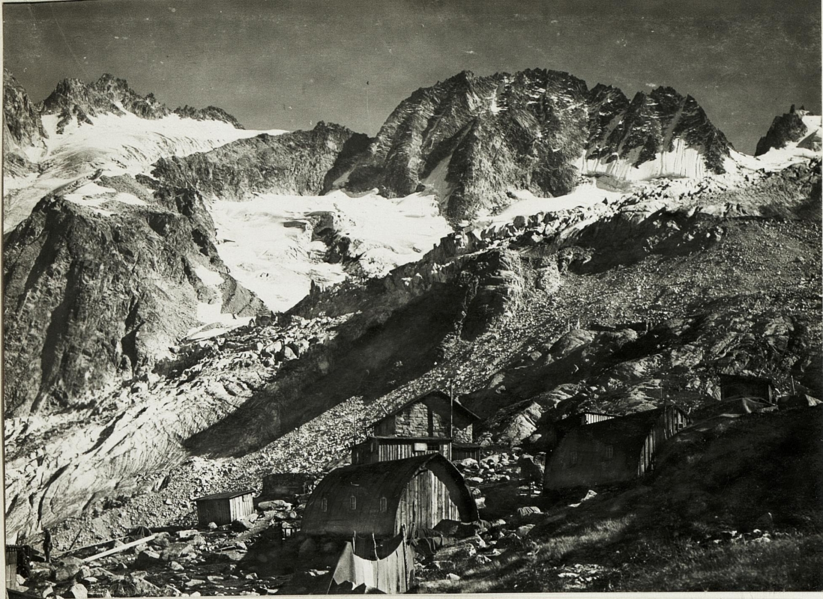 Standpunkt Rifugio Denza: Rifugio Denza mit Cima d' Amola. Zwischenstation Malga Stavel, Cercenpass.